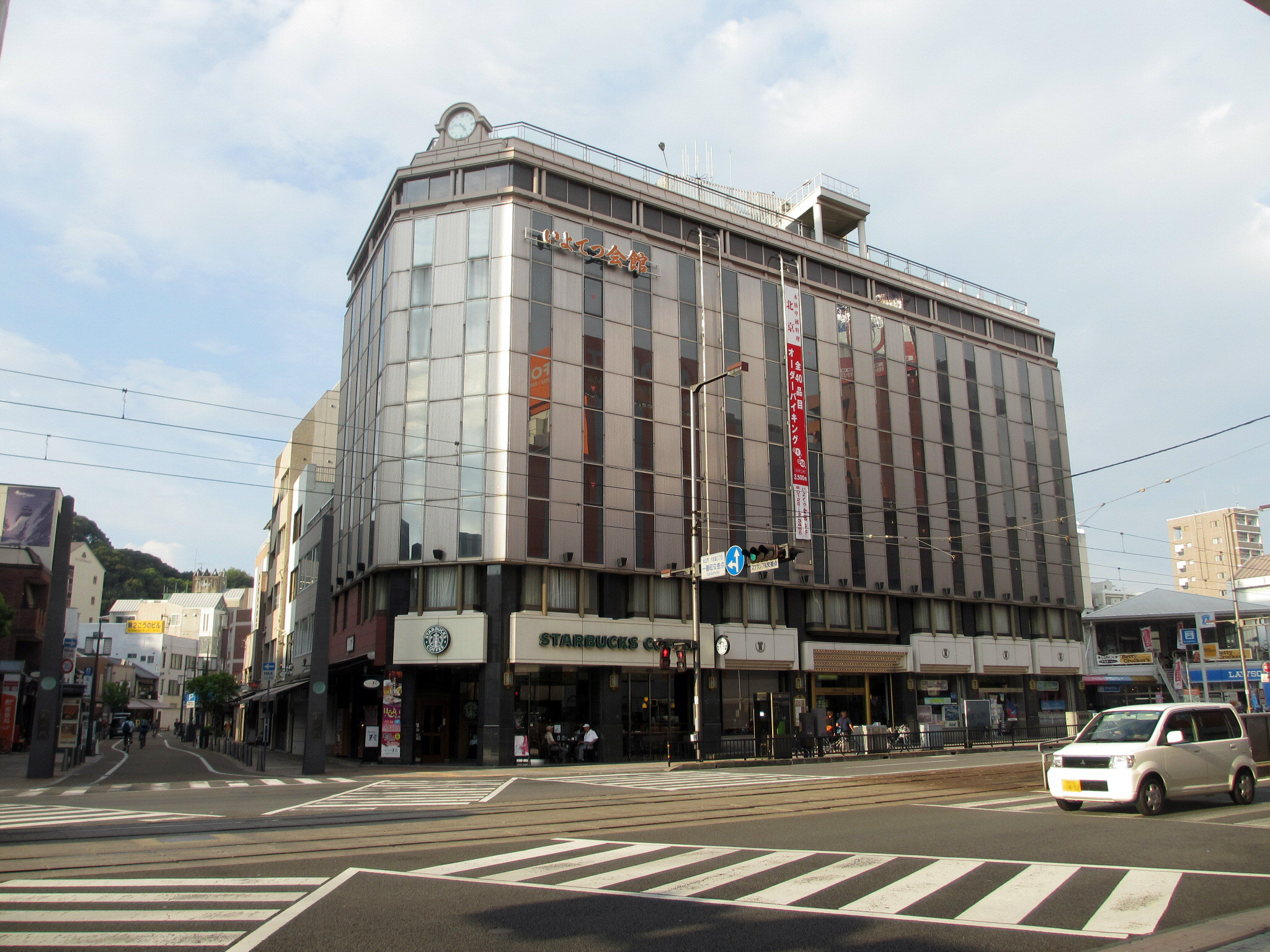 Okaido